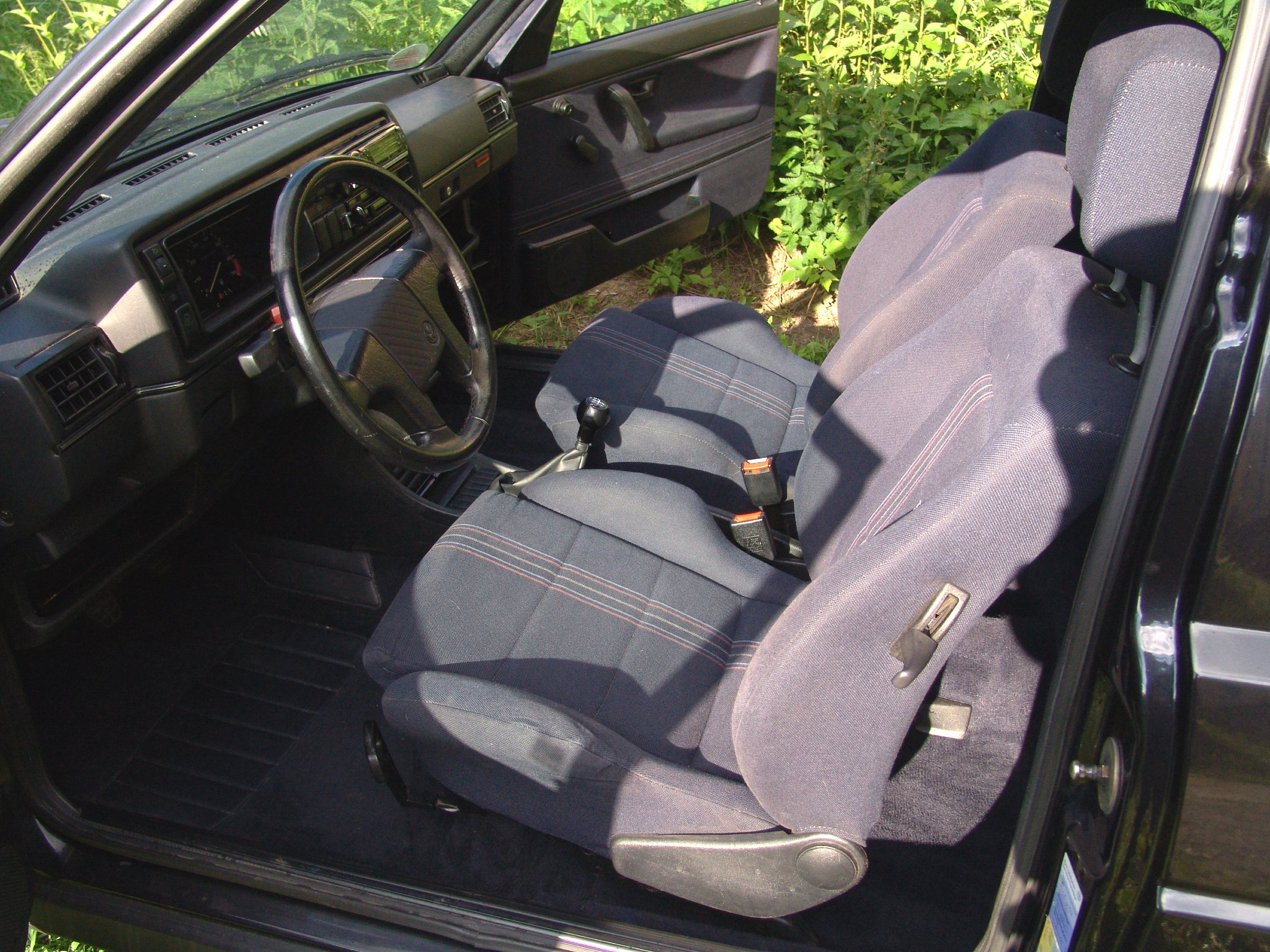 Innenansicht VW Golf II GTI Edition One. Die Farbverfälschungen auf den Sitzen wurden durch Sonneneinfall durch die grüne Wärmeschutzverglasung herbeigeführt.